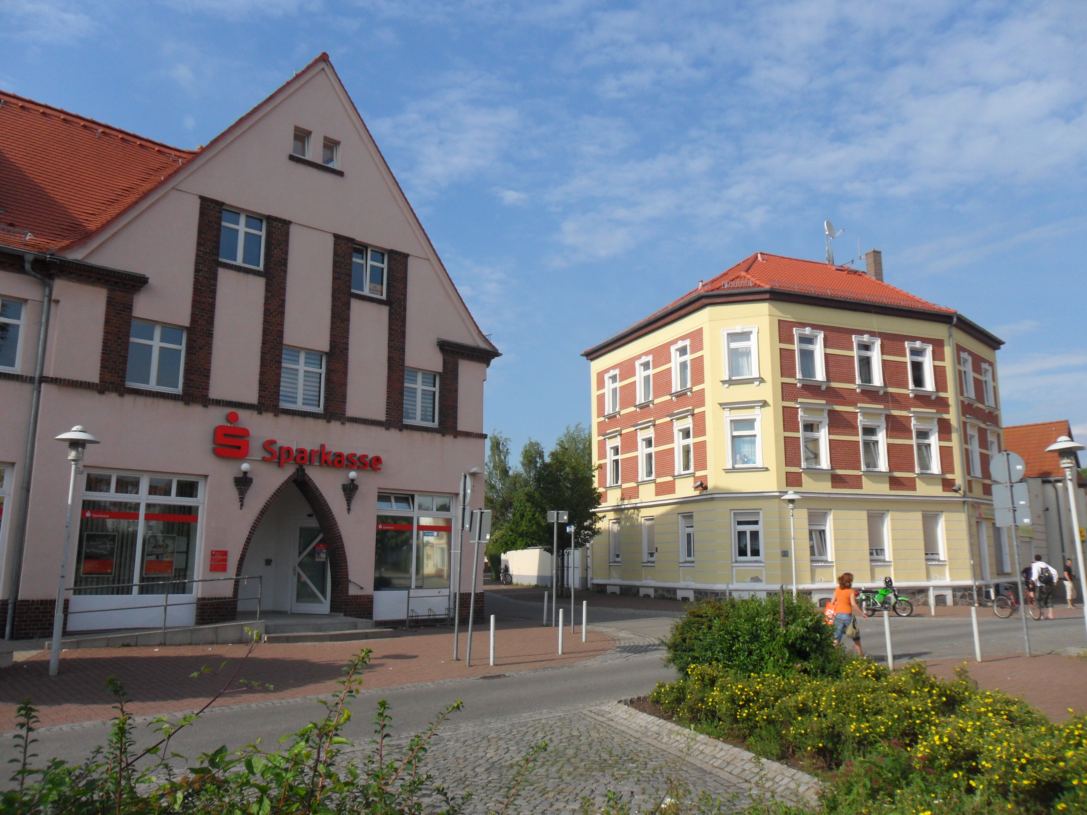 Einmündung der Kirchgasse in die Bahnhofstraße zwischen den Anwesen Bahnhofstraße 14 und 16